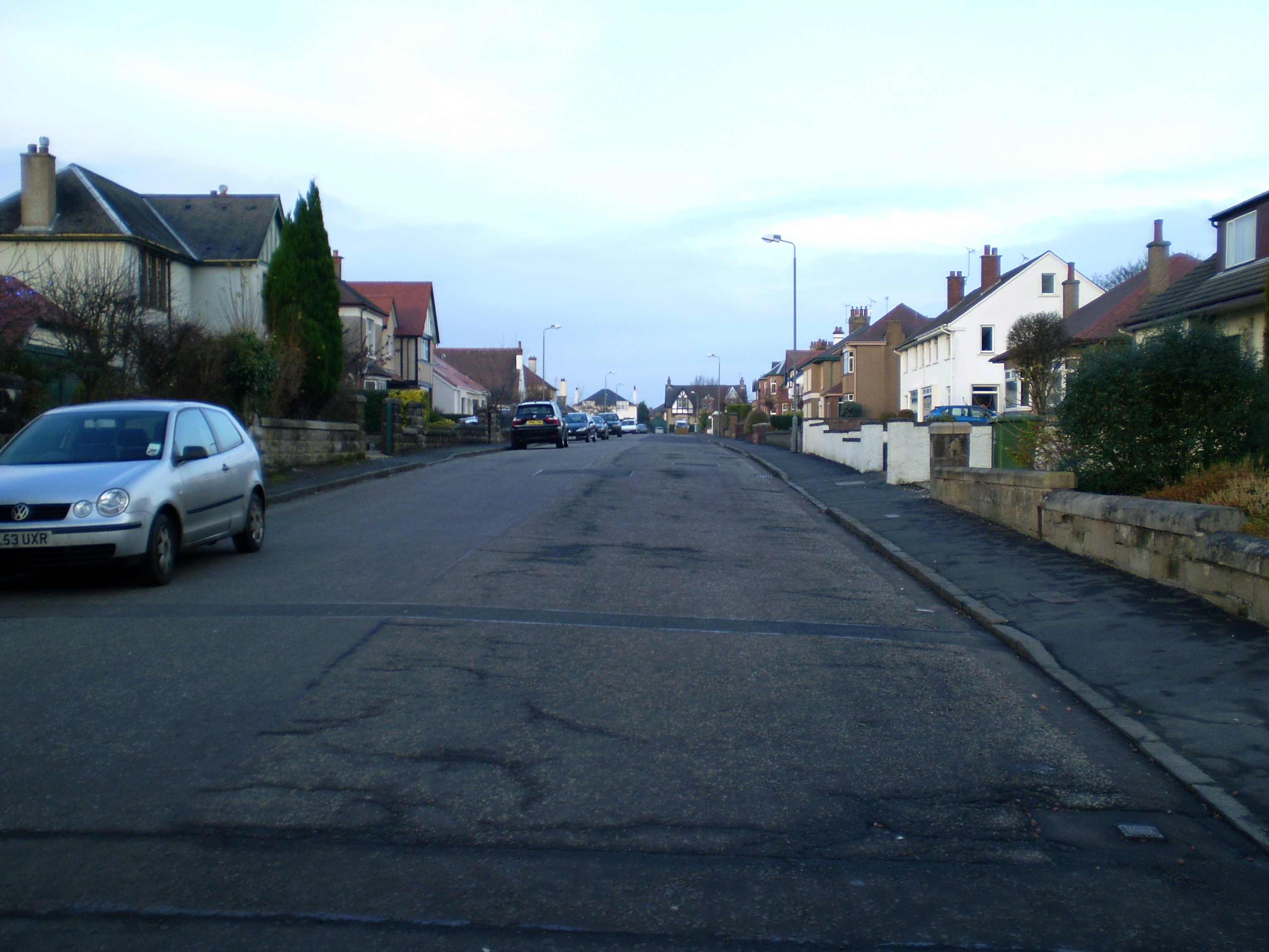 Residential street in Larbert